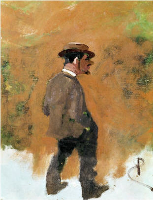 René Princeteau, Henri de Toulouse-Lautrec im Alter von 19 Jahren